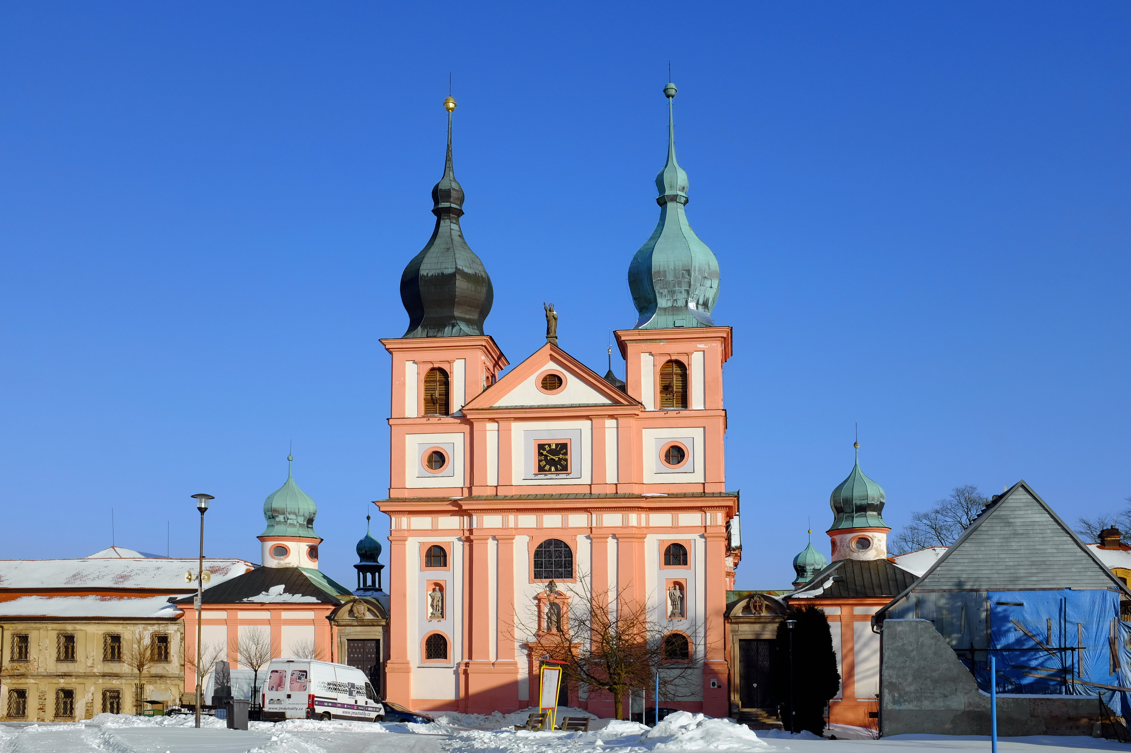 Proboštství svaté Maří Magdalény, nám. J. W. Goetheho 1, Chlum Svaté Maří.